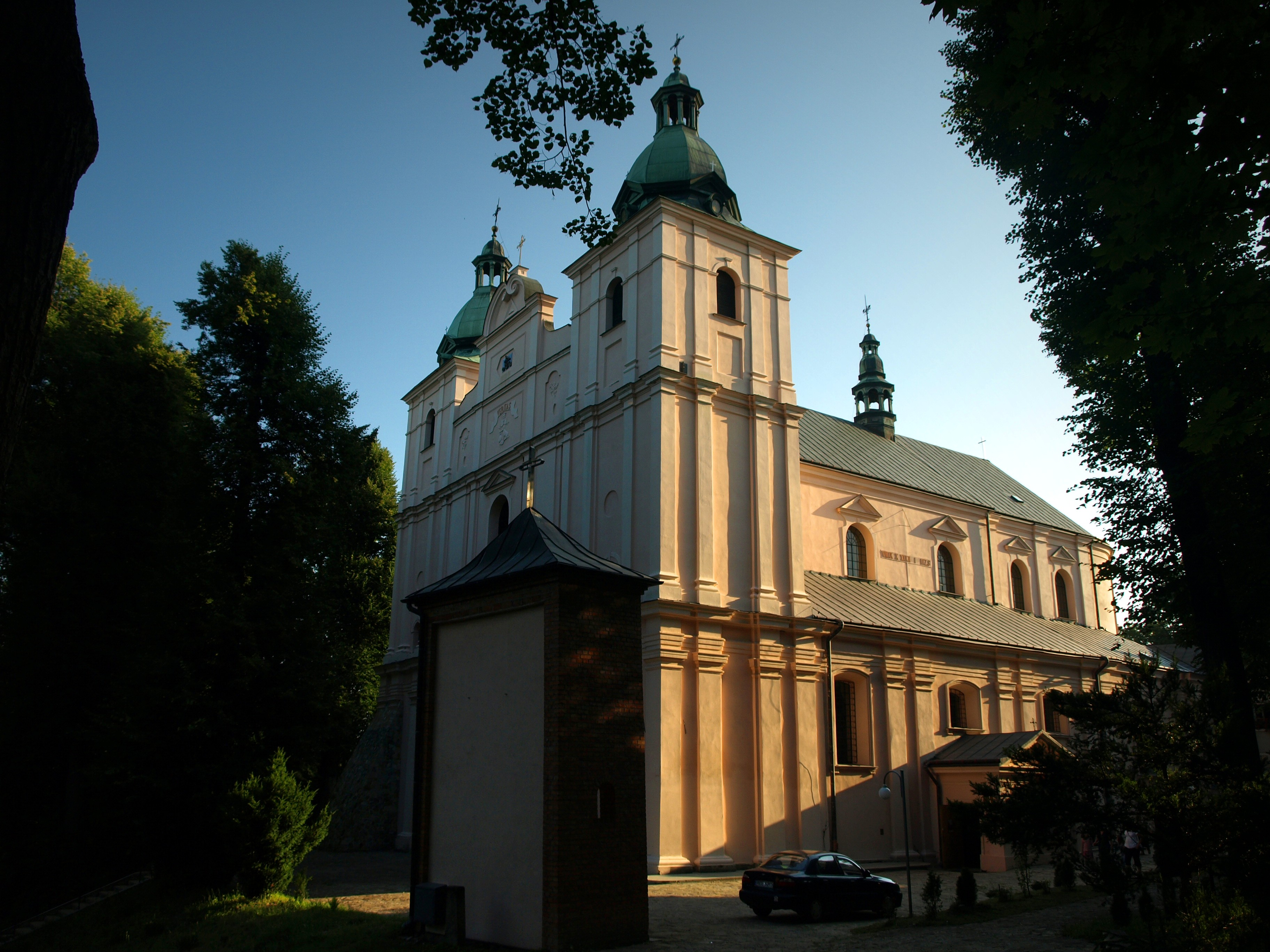 Borek Stary - kościół p.w. Wniebowzięcia NMP w zespole klasztornym dominikanów (zabytek nr rejestr. A-326)